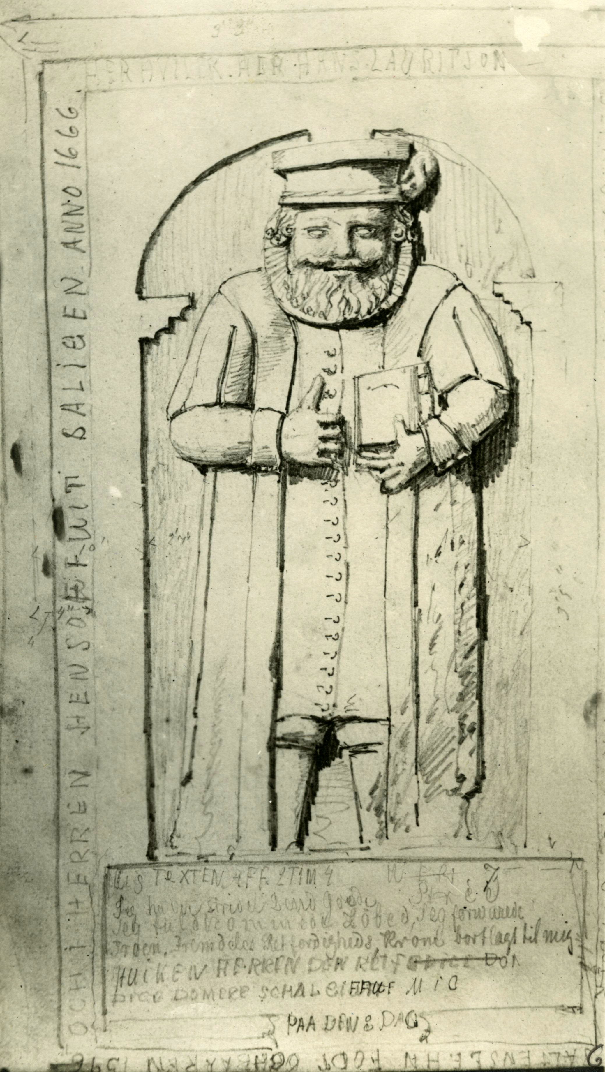 Format: Fotopositiv. Avtegning av Hans Lauritzon Blix' gravplate i Bodin kirke. Teksten rundt gravplaten lyder: HER HVILER HER HANS LAURITSON BLIX. SOGNEHERRE TIL BAADE GIELD OCH PROWIST OFFVER SALTENS LEHN FØDT OCH BAAREN ANNO 1596 OCH I HERREN HENSOFFVET SALIGEN ANNO 1666 Teksten under mannsfiguren inneholder en referanse til 2 Tim. v. 4: Jeg glemmer ikke tårene dine, og jeg lengter etter å se deg igjen – det ville gjøre meg inderlig glad.